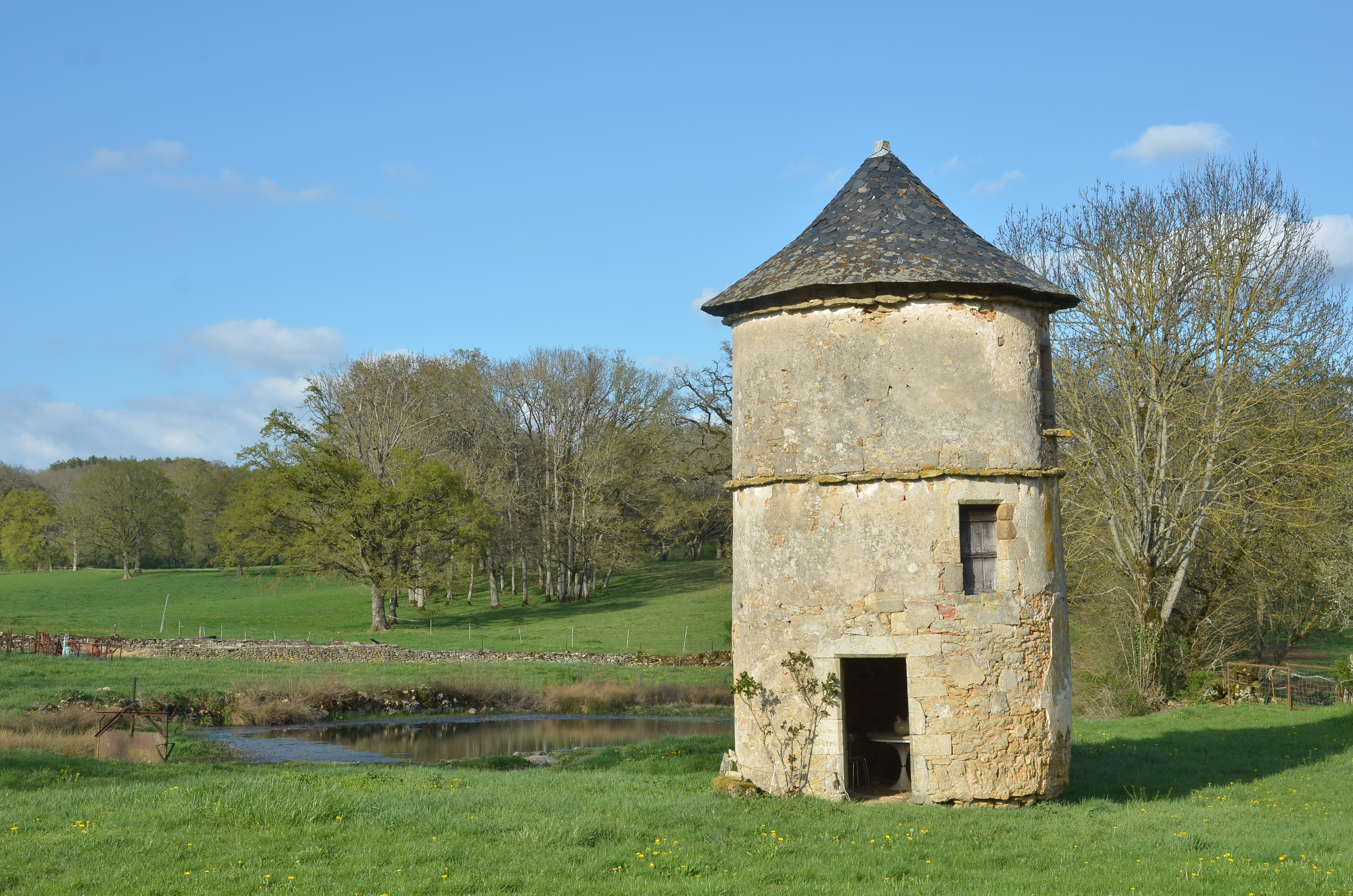 Pigeonier dans le Hameau de Mons, Assier, Lot, France sur le territoire d'une ancienne commanderie templière